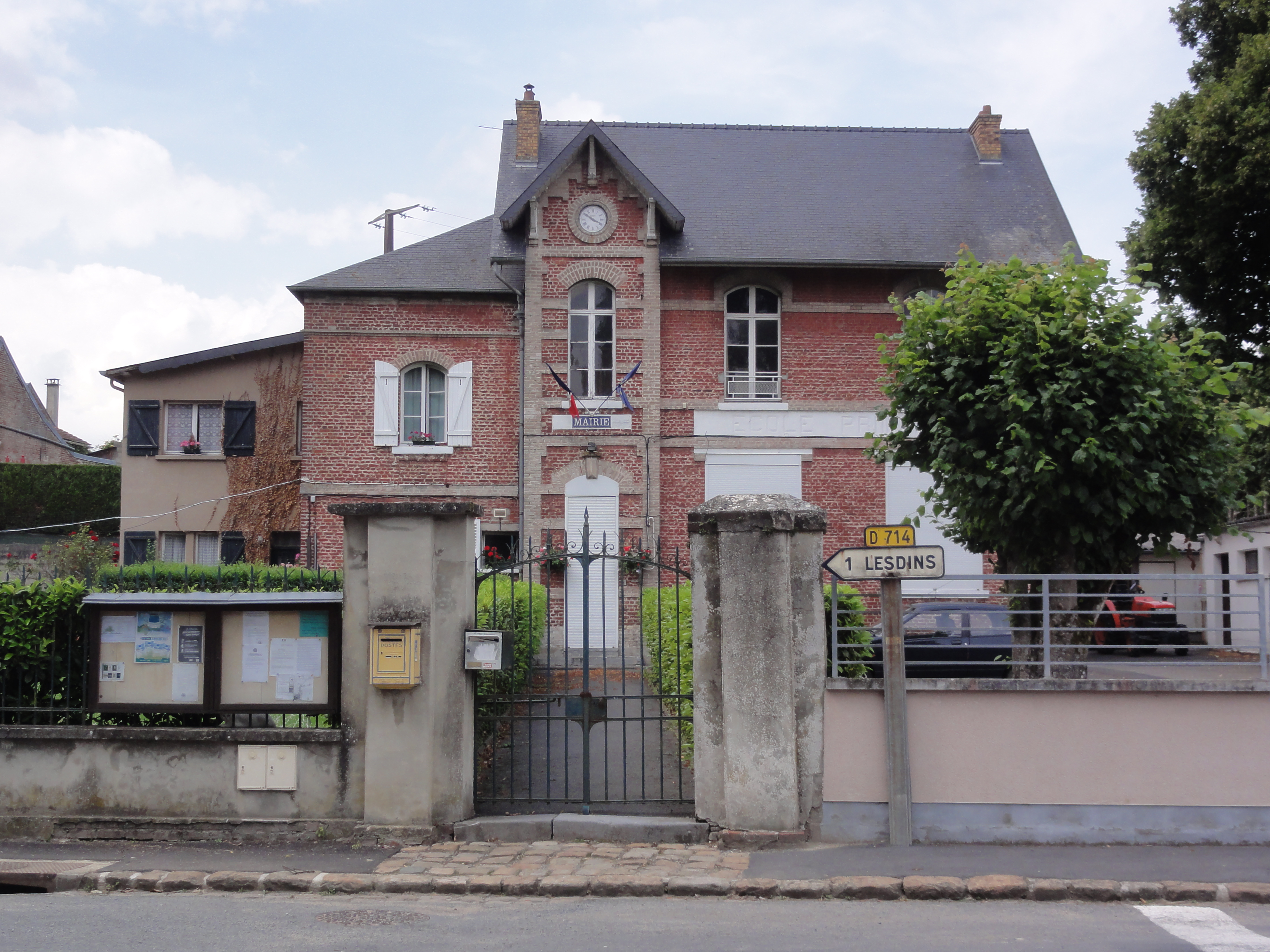 Remaucourt (Aisne) mairie